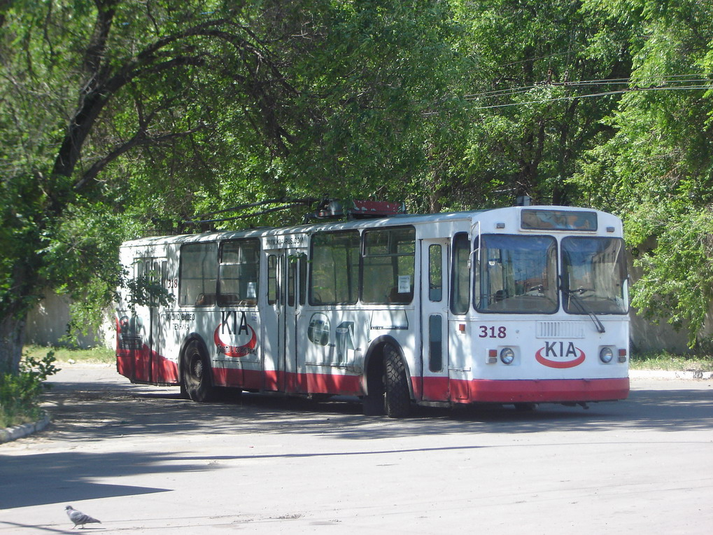 Троллейбус ЗиУ-9 в Воронеже